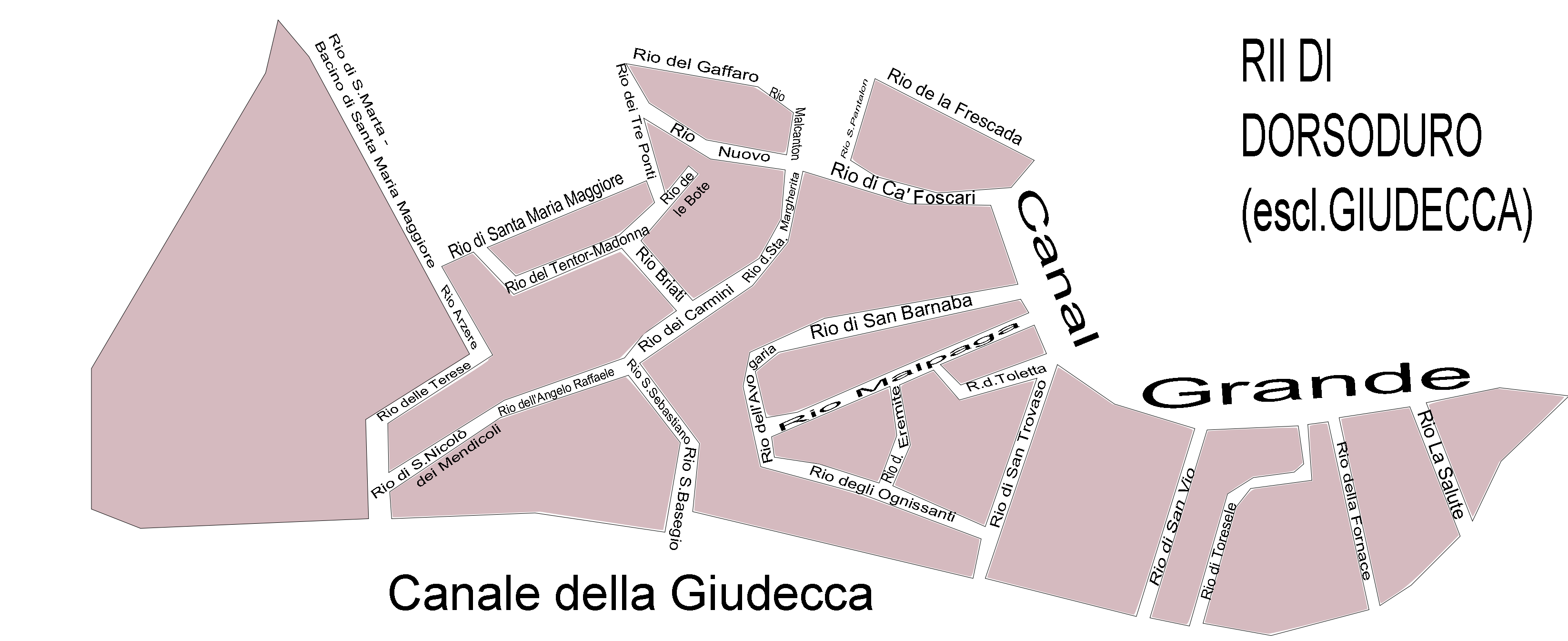 canaux de dorsoduro (sans Giudecca) - Venise